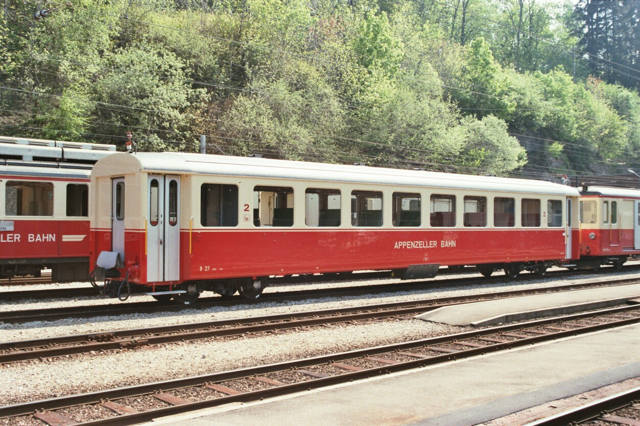 B 27 (FFA Typ I, 1973, heute B 243) der Appenenzellerbahn in Herisau